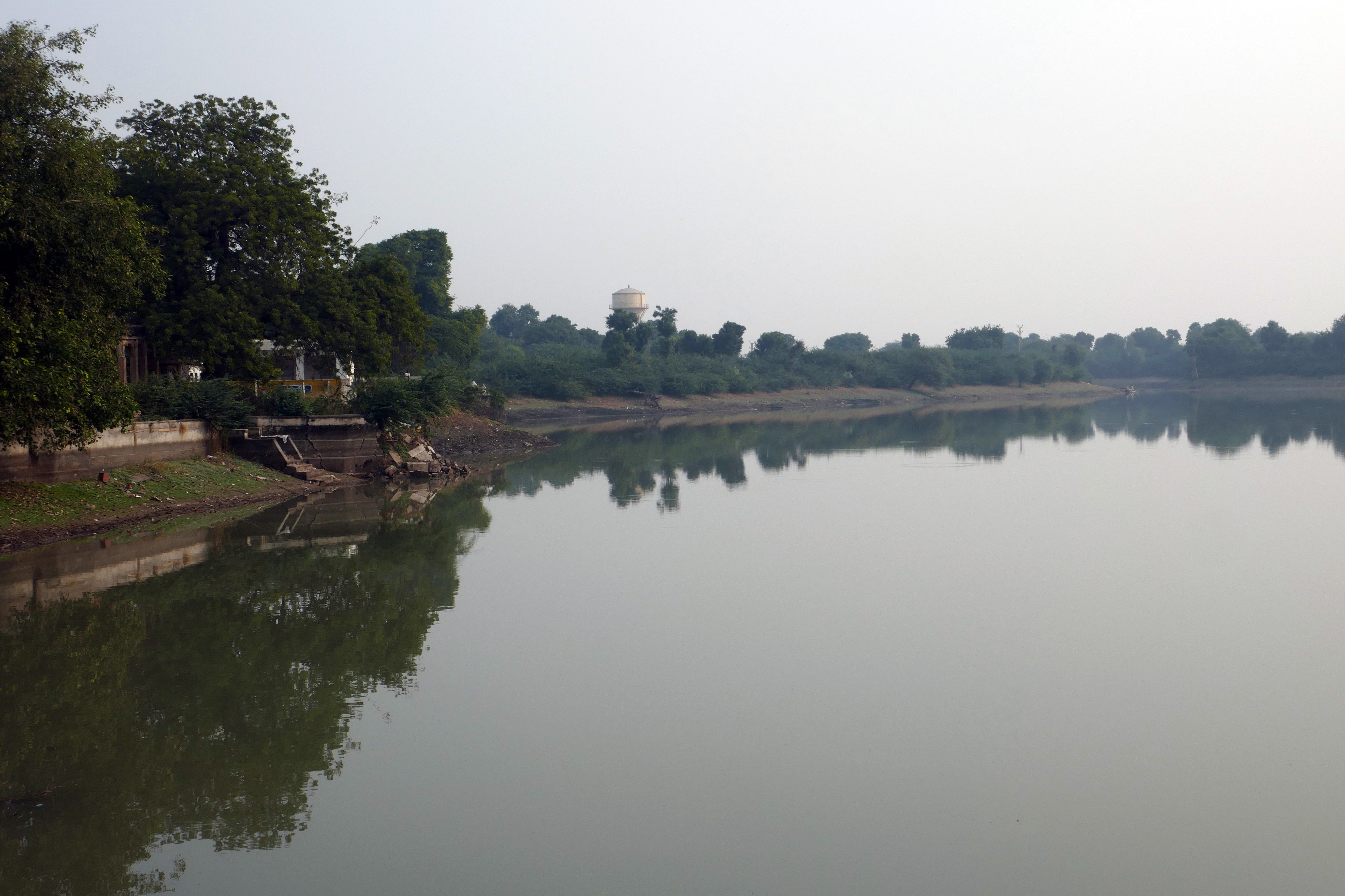 Verdure et plan d'eau à Kherwa (Rajasthan).